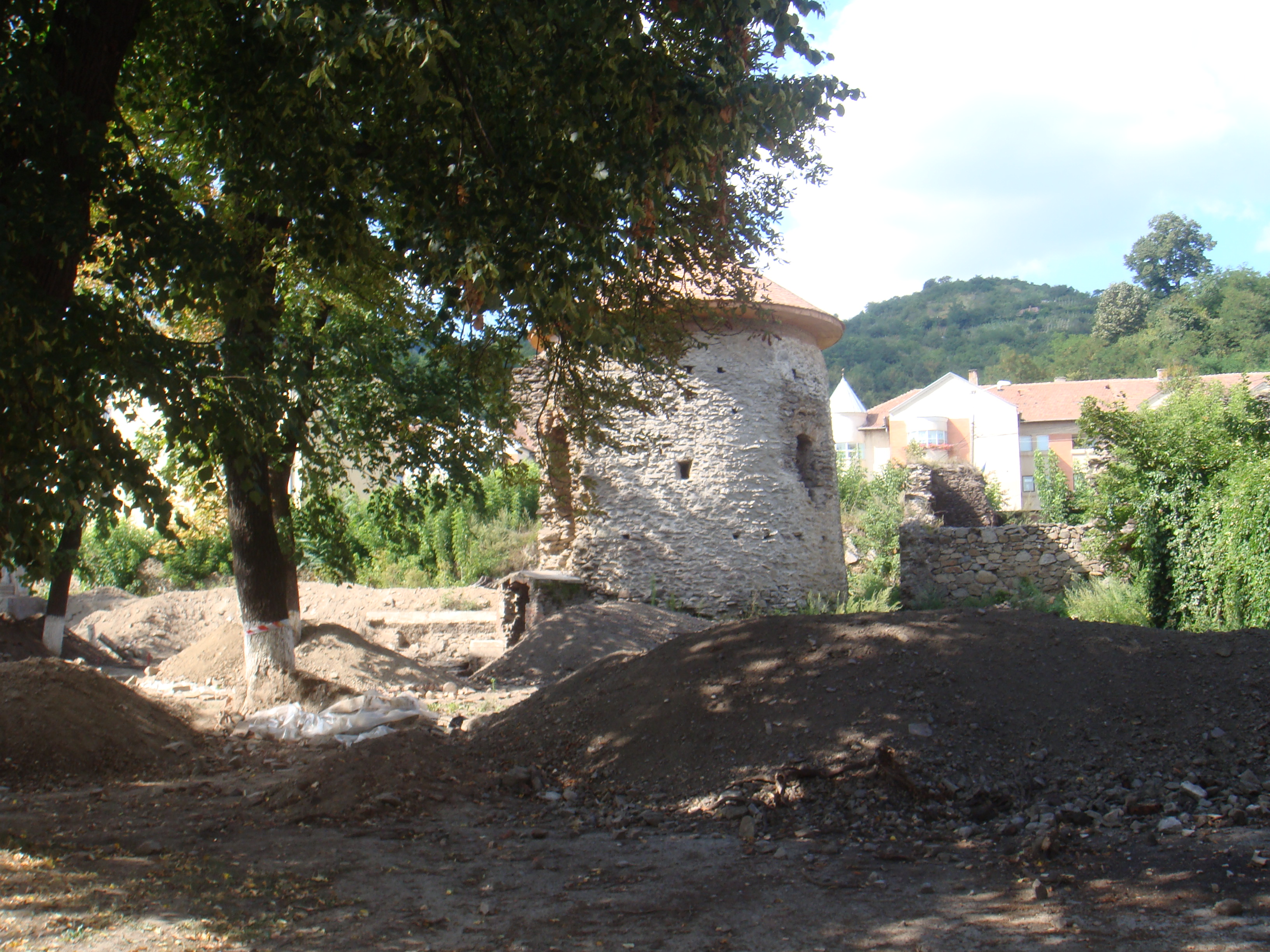 Poza 4